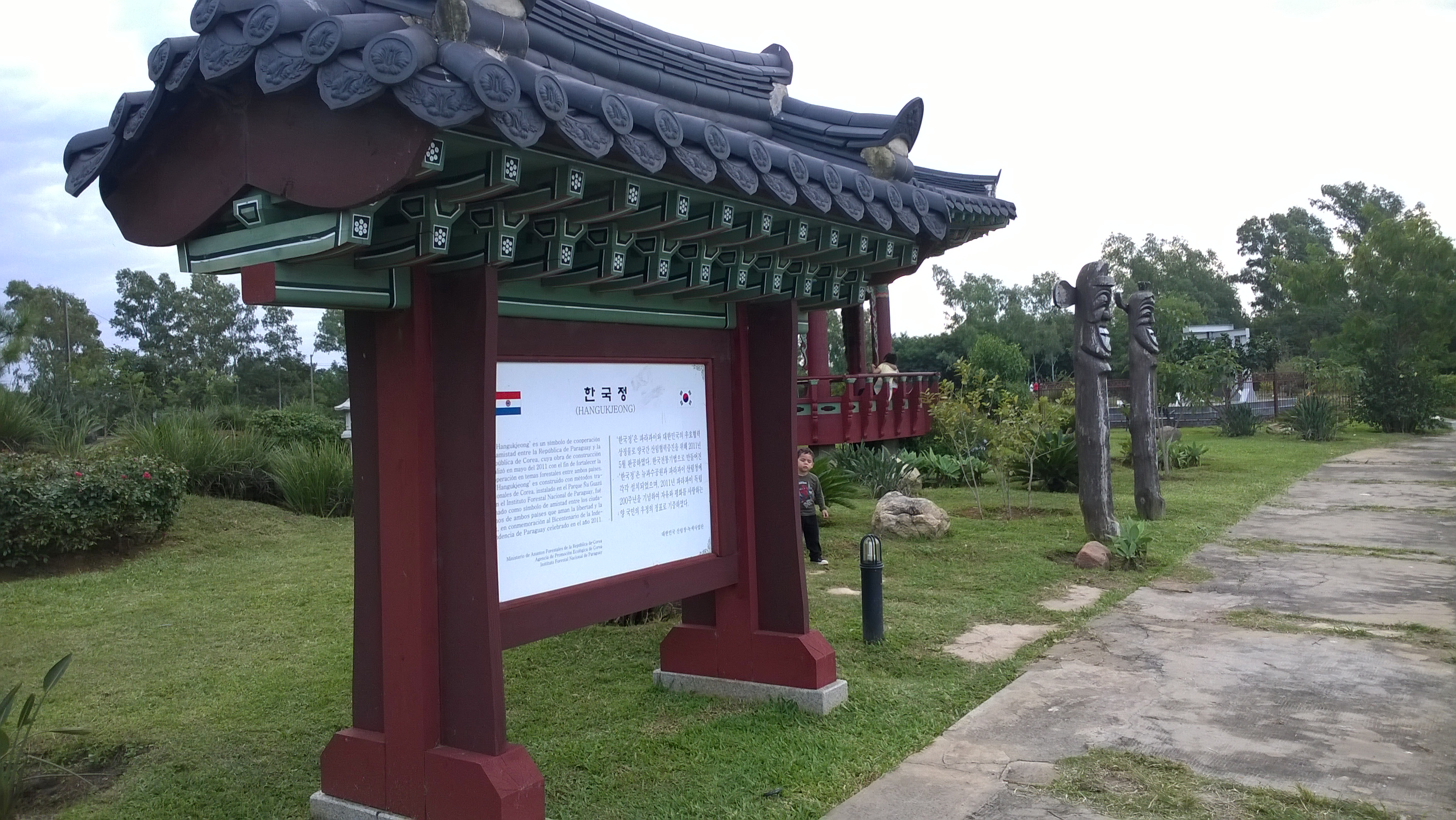 Monumento Cooperación Paraguay Korea 1